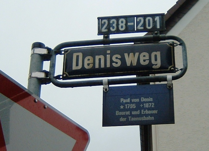 Denisweg in Frankfurt am Main (Paul Camille von Denis) frz, Ingenieur